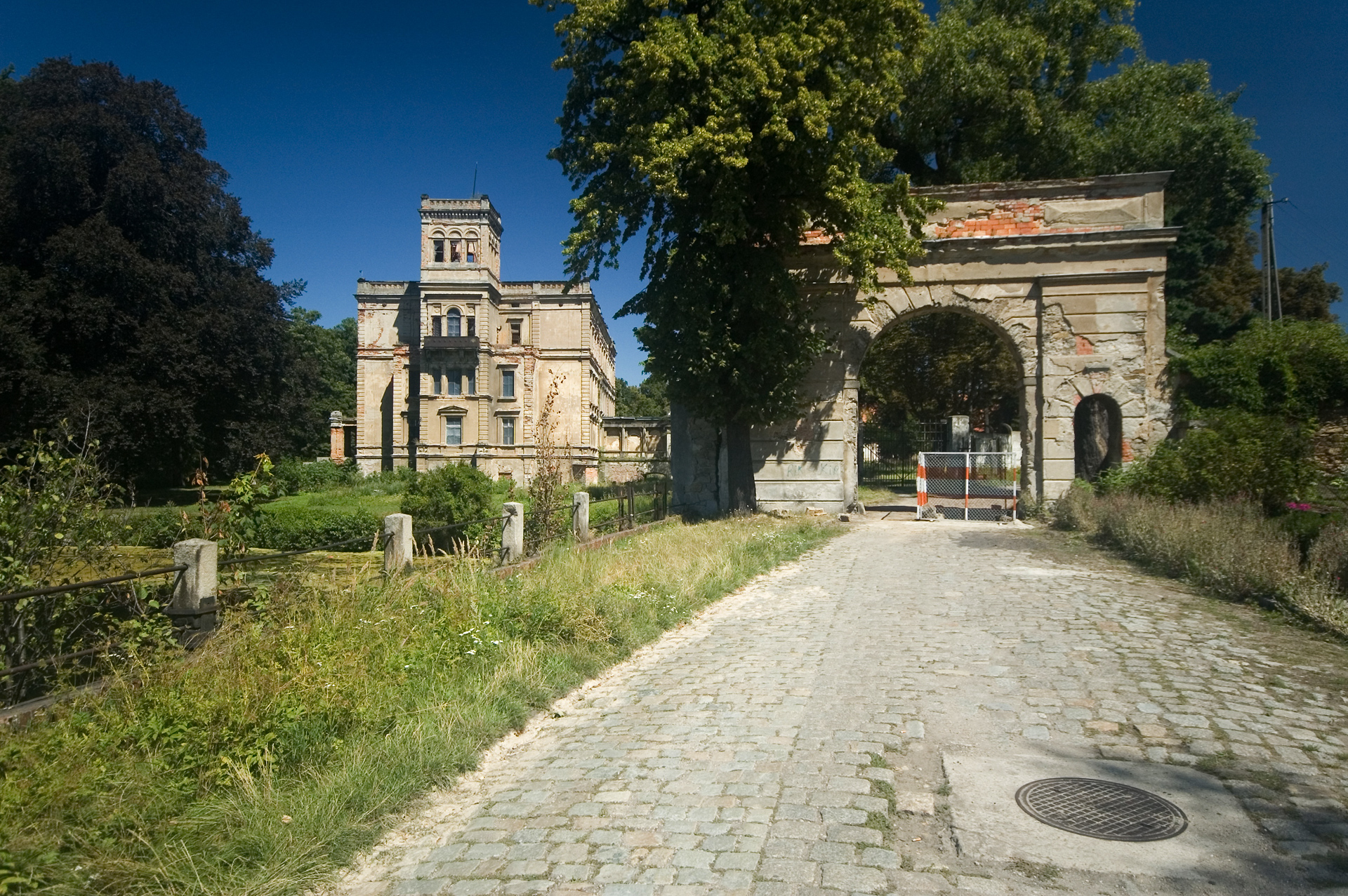 Mrowiny, ul. Zamkowa - pałac (zabytek nr A/4418/604/Wł z dn. 30.11.1975)